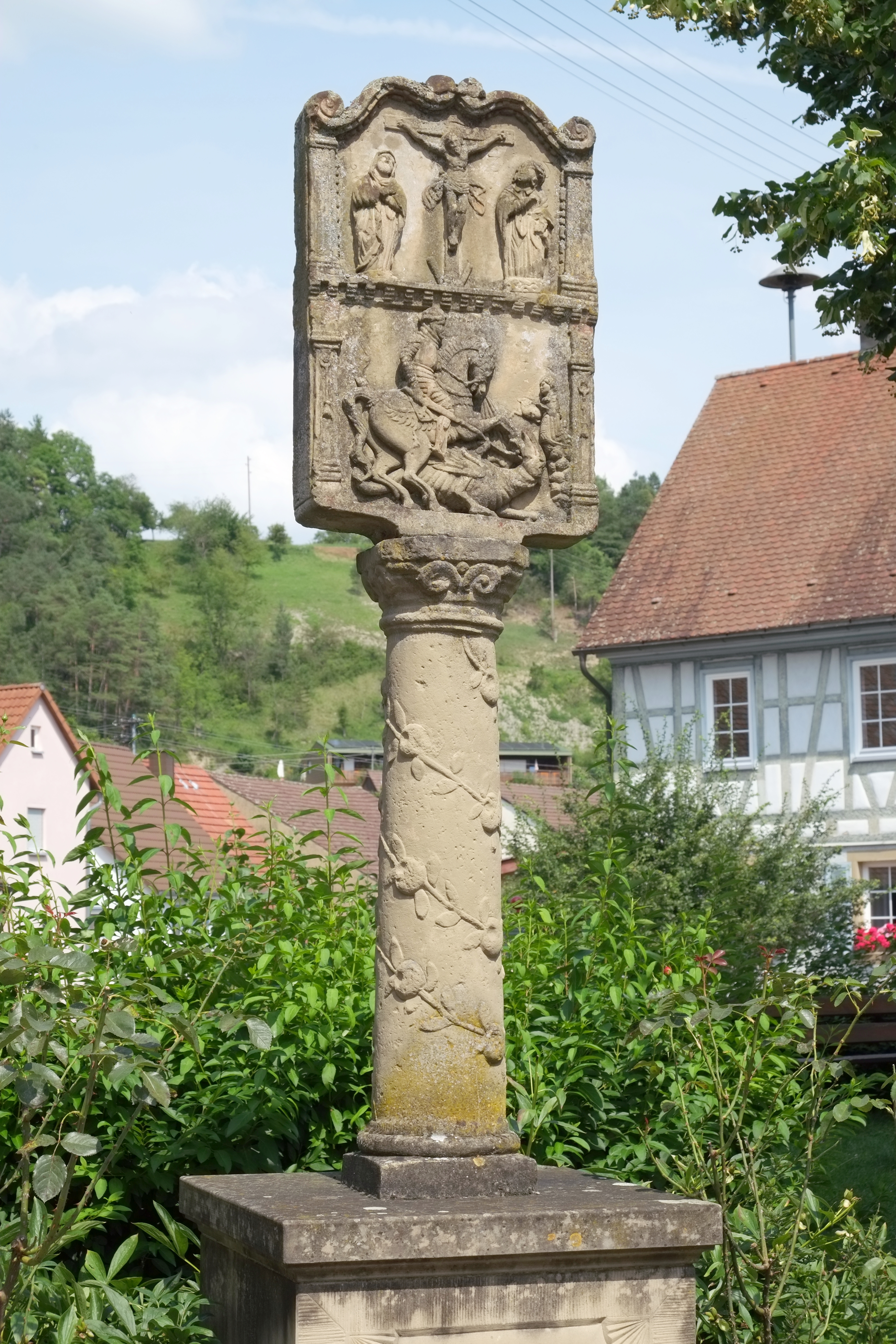 Bildstock in Sindeldorf, einem Ortsteil von Schöntal im Hohenlohekreis (Baden-Württemberg, Deutschland)